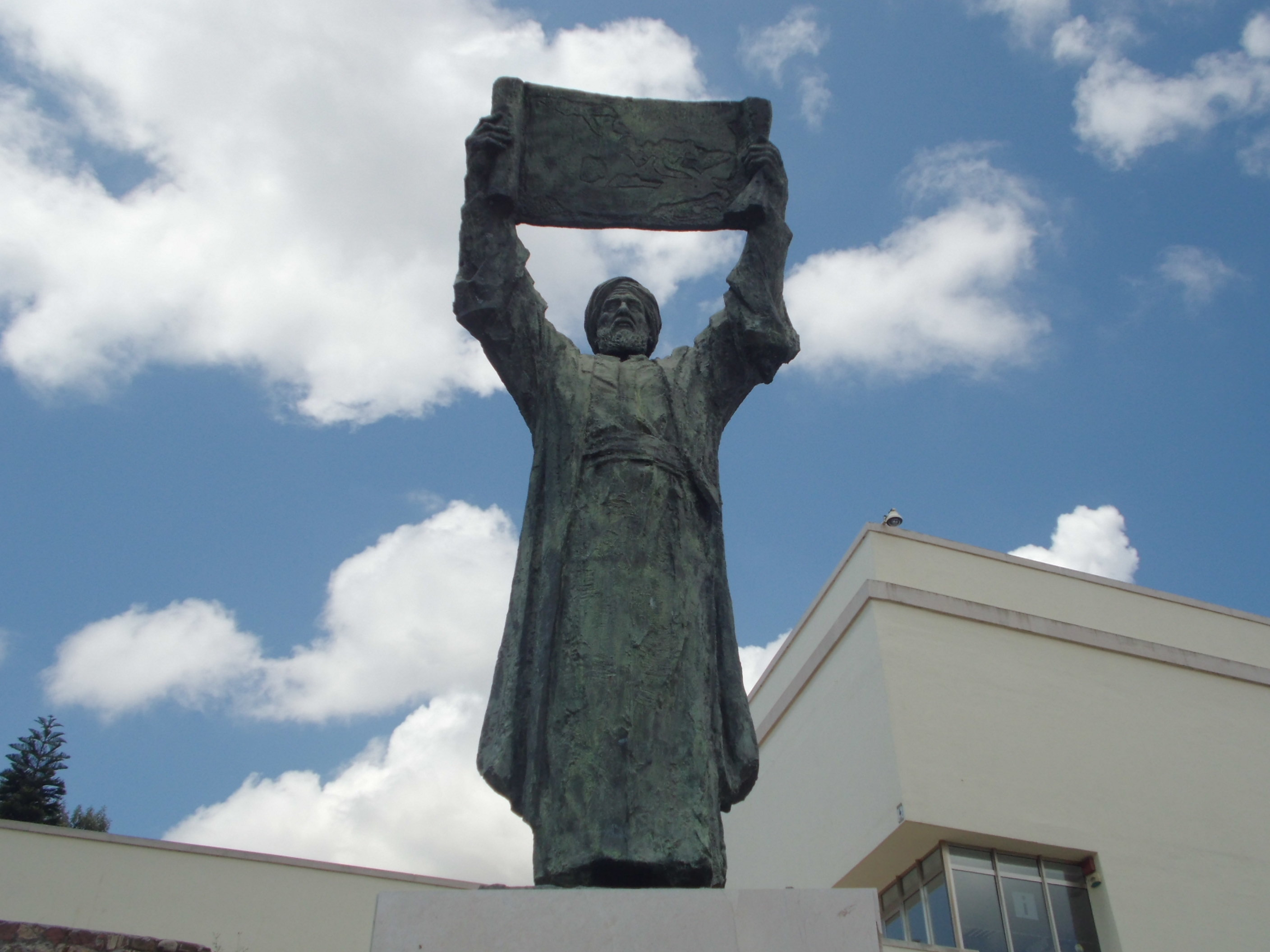 Estatua de Al-Idrisi en Ceuta, España